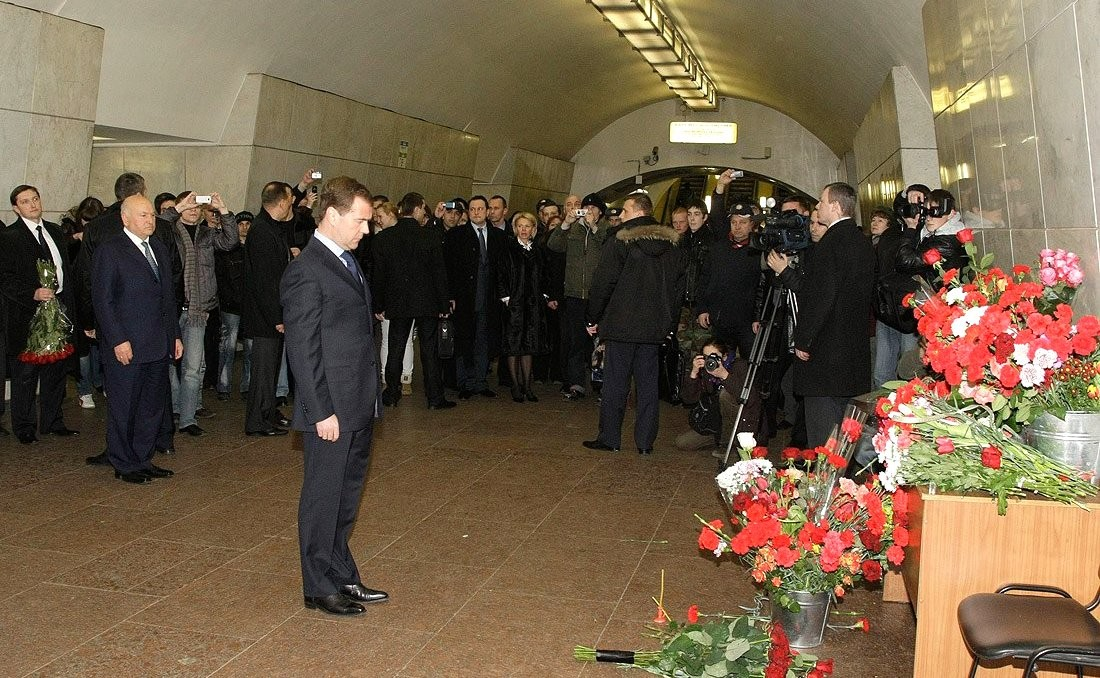 Глава государства возложил цветы к месту теракта на станции метро «Лубянка» и почтил память погибших.